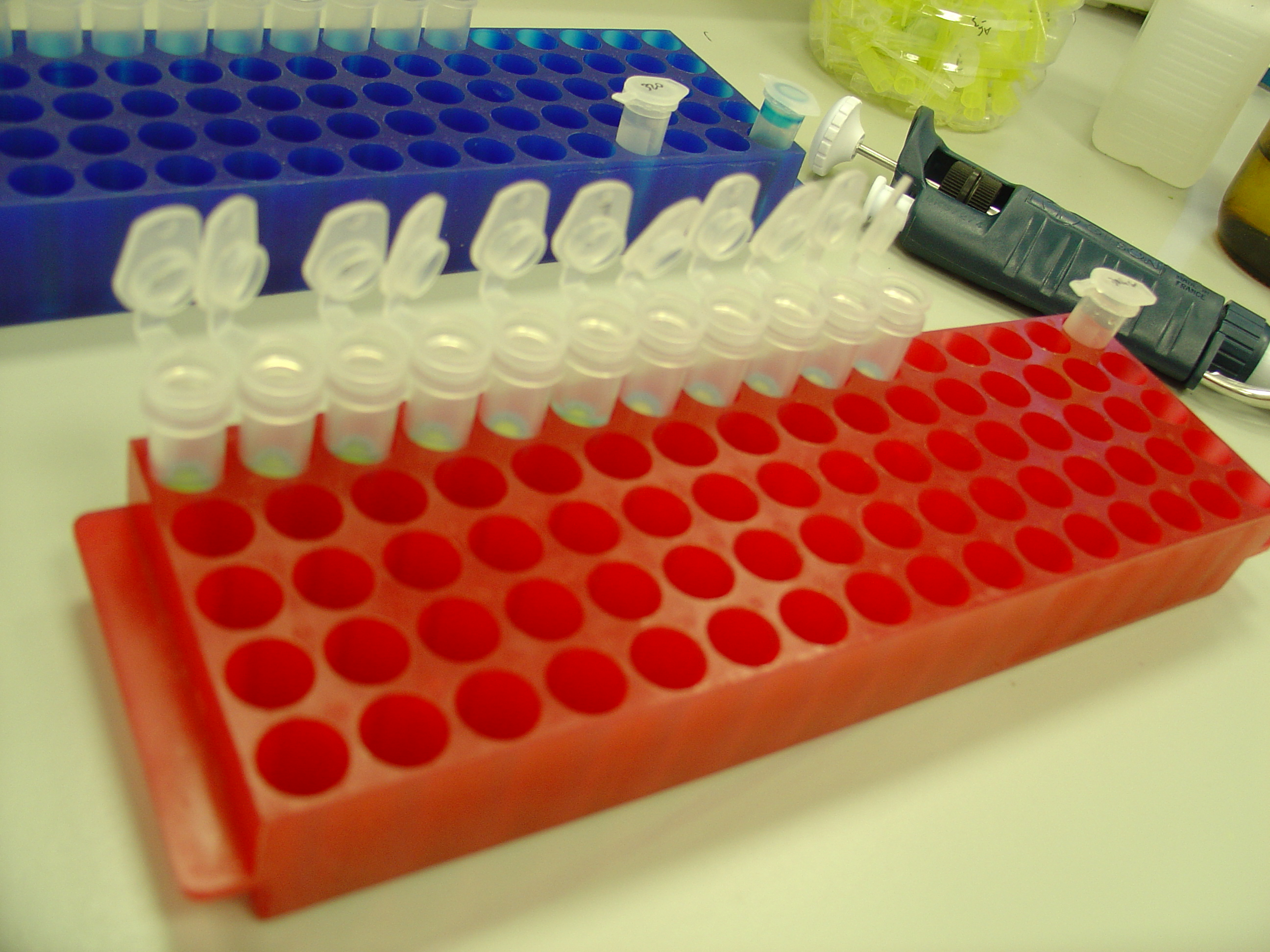 Gradillas con tubos eppendorf y minicolumnas de extracción de ARN.